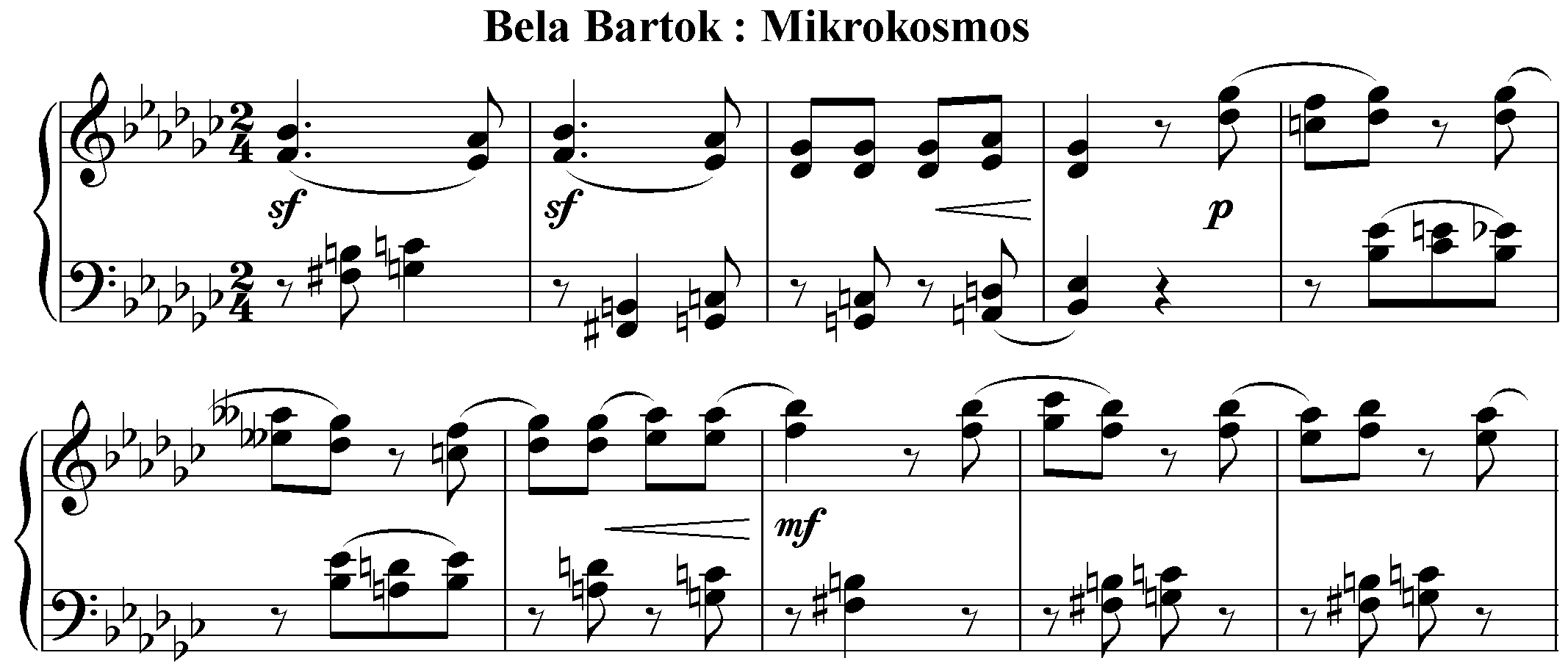 بلابارتوک میکروکاسموس